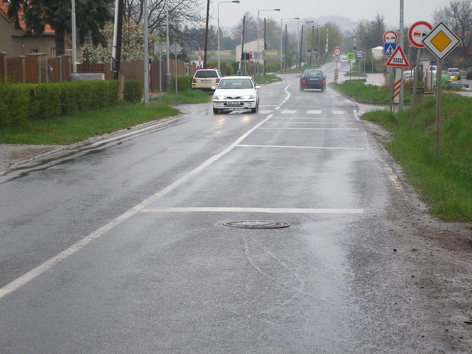 Optická brzda před přechodem pro chodce v Praze - Kbelích.